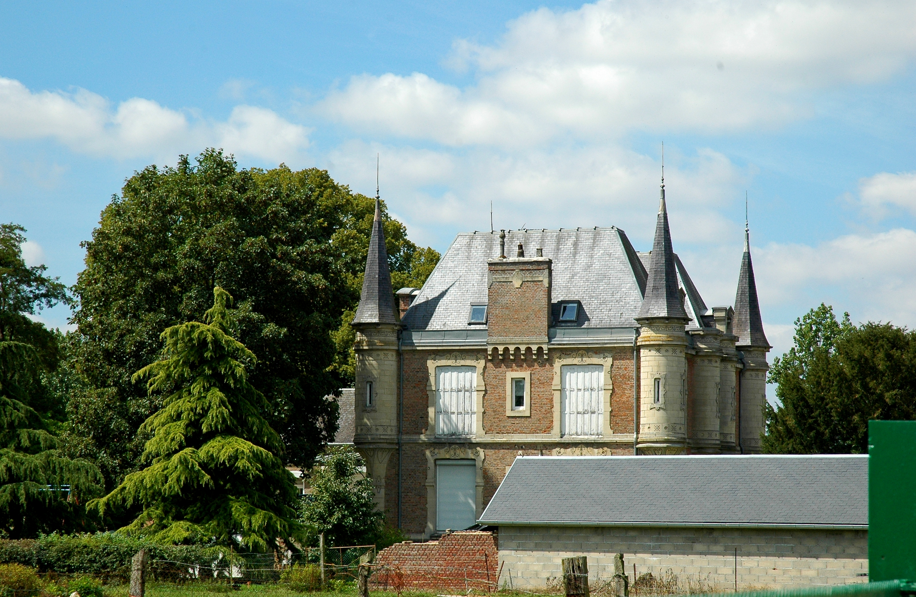 Mérélessart (Somme, France). Architecture locale.